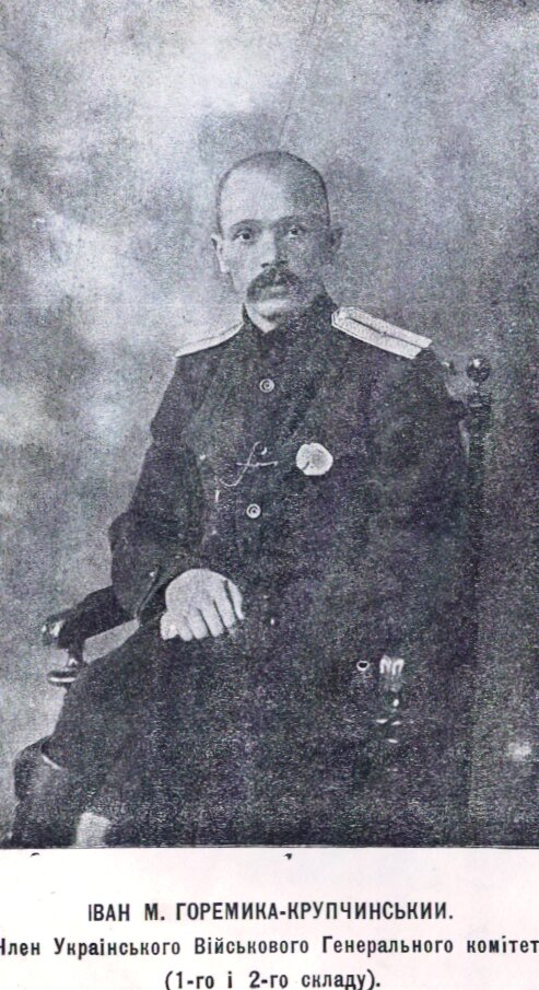 член Українського генерального військового комітету, старшина Армії УНР та Армії Української Держави.